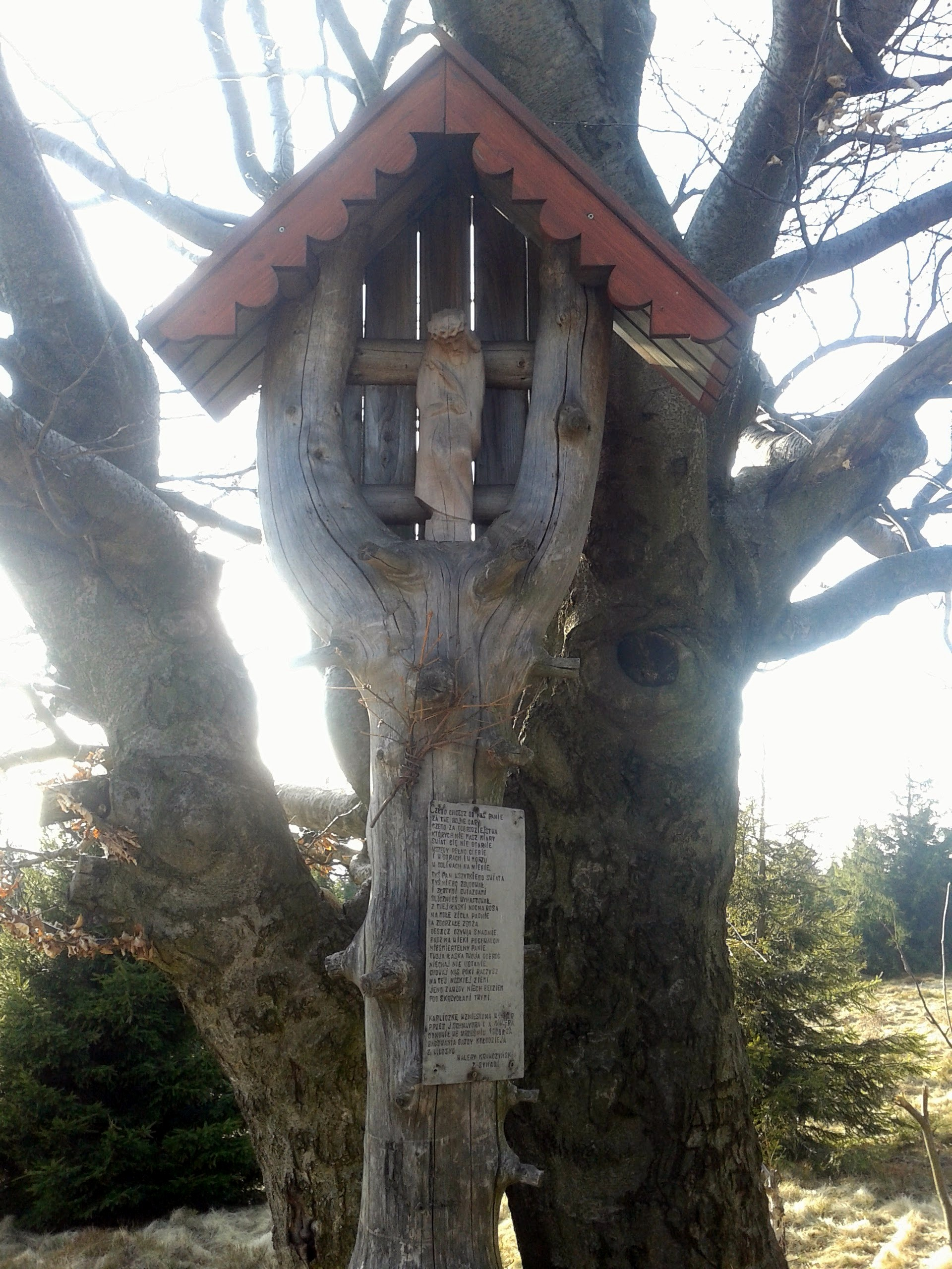 Kapliczka zbudowana w 1949 roku a odnowiona we wrześniu 1960 roku za bacowania gazdy Kołodzieja z Wilczyc.